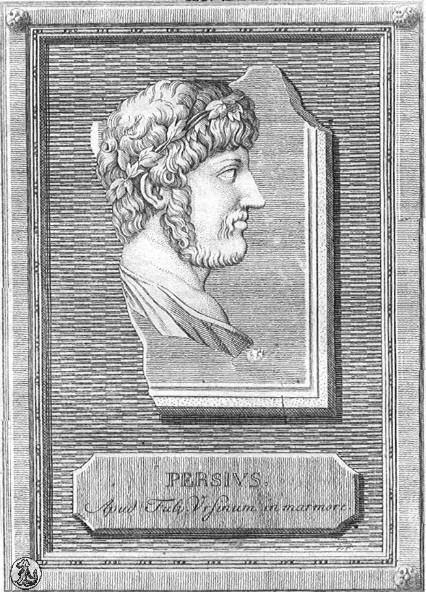 Aulus Persius Flaccus, scriptor romanus